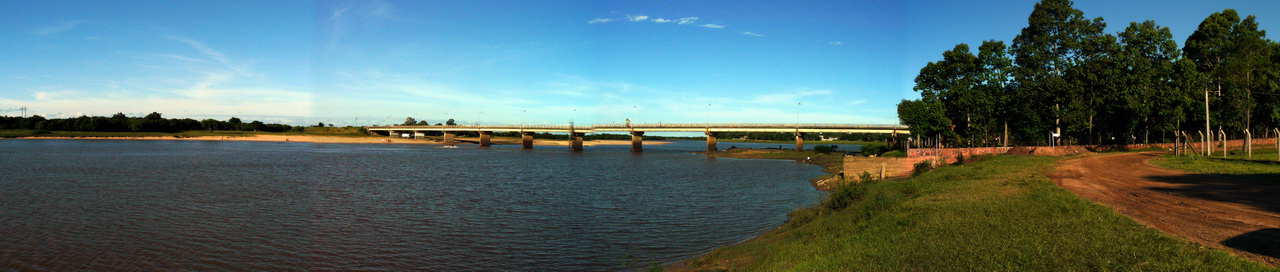 Fotos tomadas por mí, a inicios del año 2008 vista panoramica